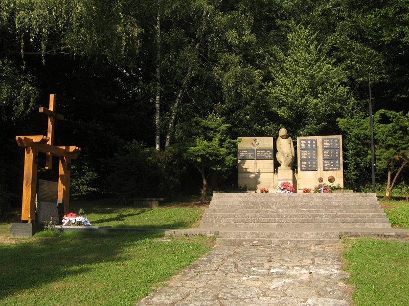 Pomník protifašistických bojovníků (Licoměřice), Licoměřice.